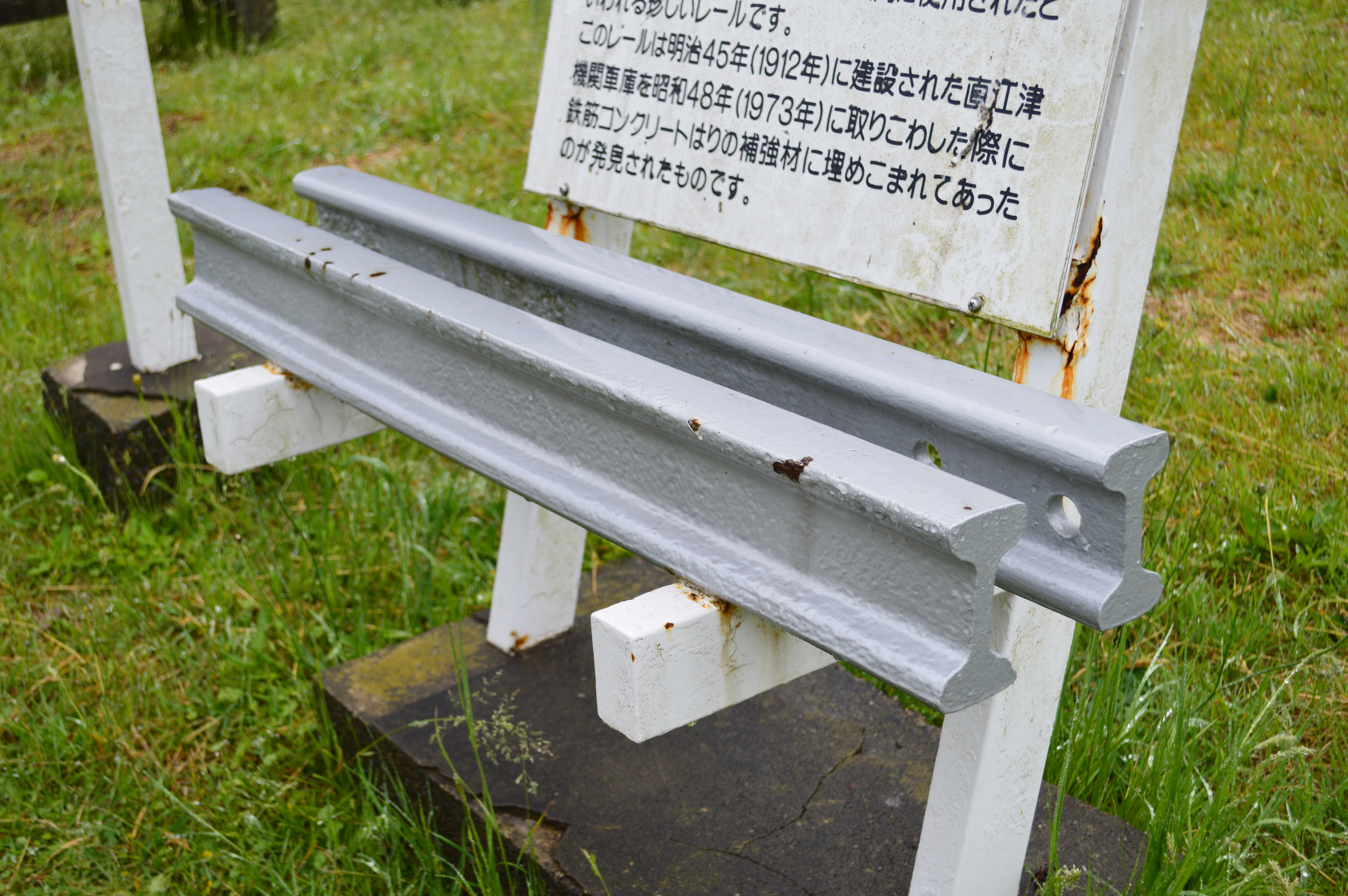 双頭レール (上越市五智交通公園にて) Nikon D3200